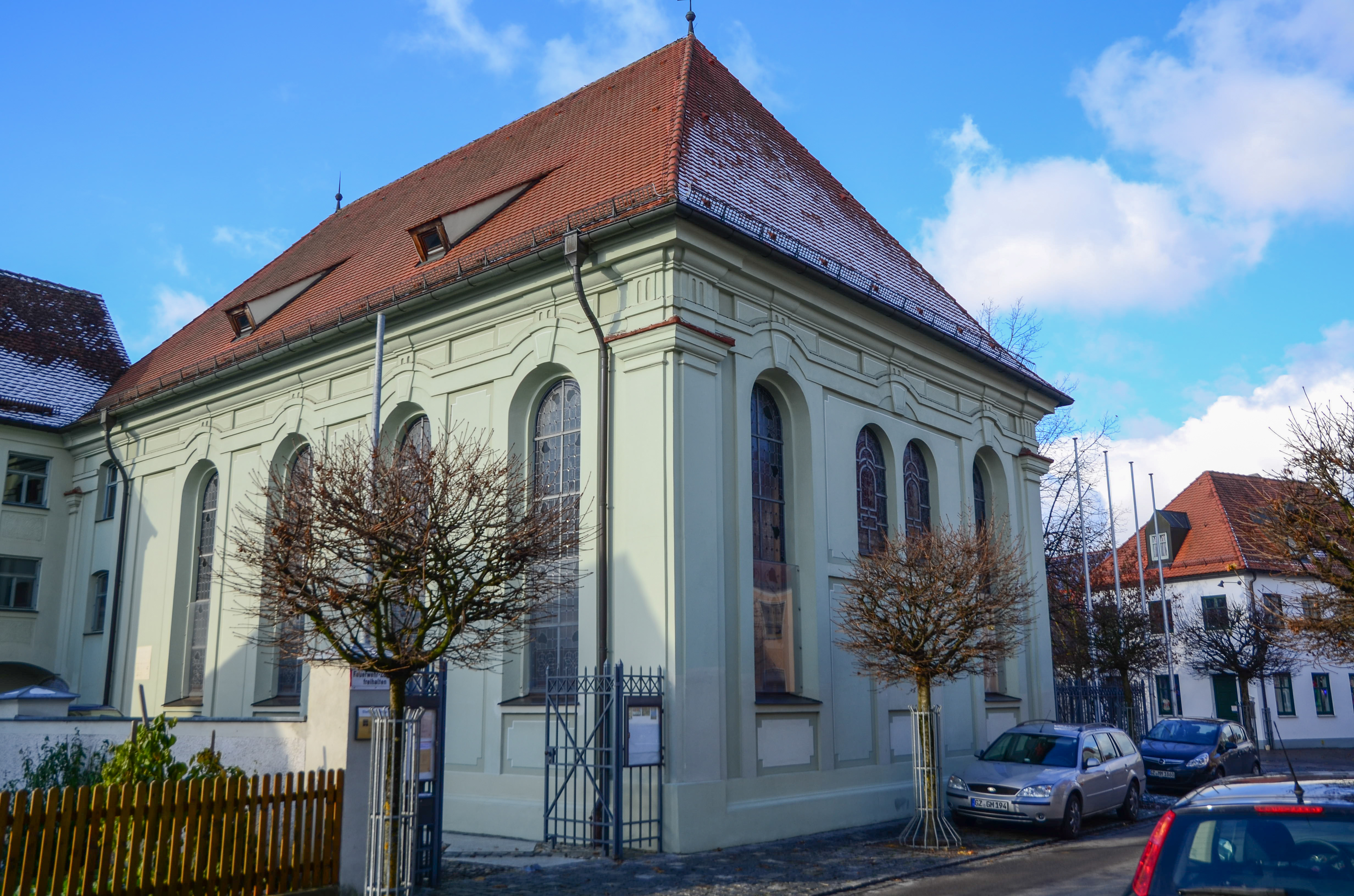 Ichenhausen, Vordere Ostergasse 22